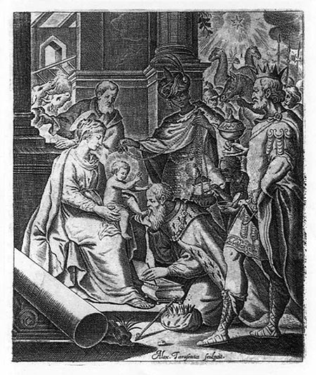 Пакланенне вешчуноў (з кнігі "Rosarium...")